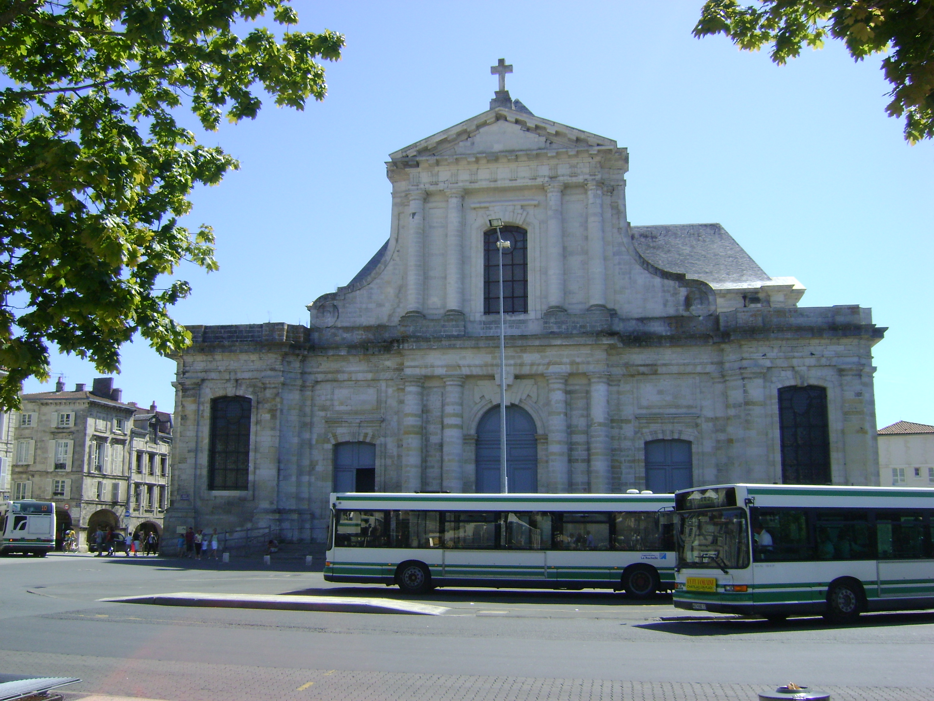 Cathédrale Saint-Louis de la Rochelle Façade extérieure vue de la Place de Verdun